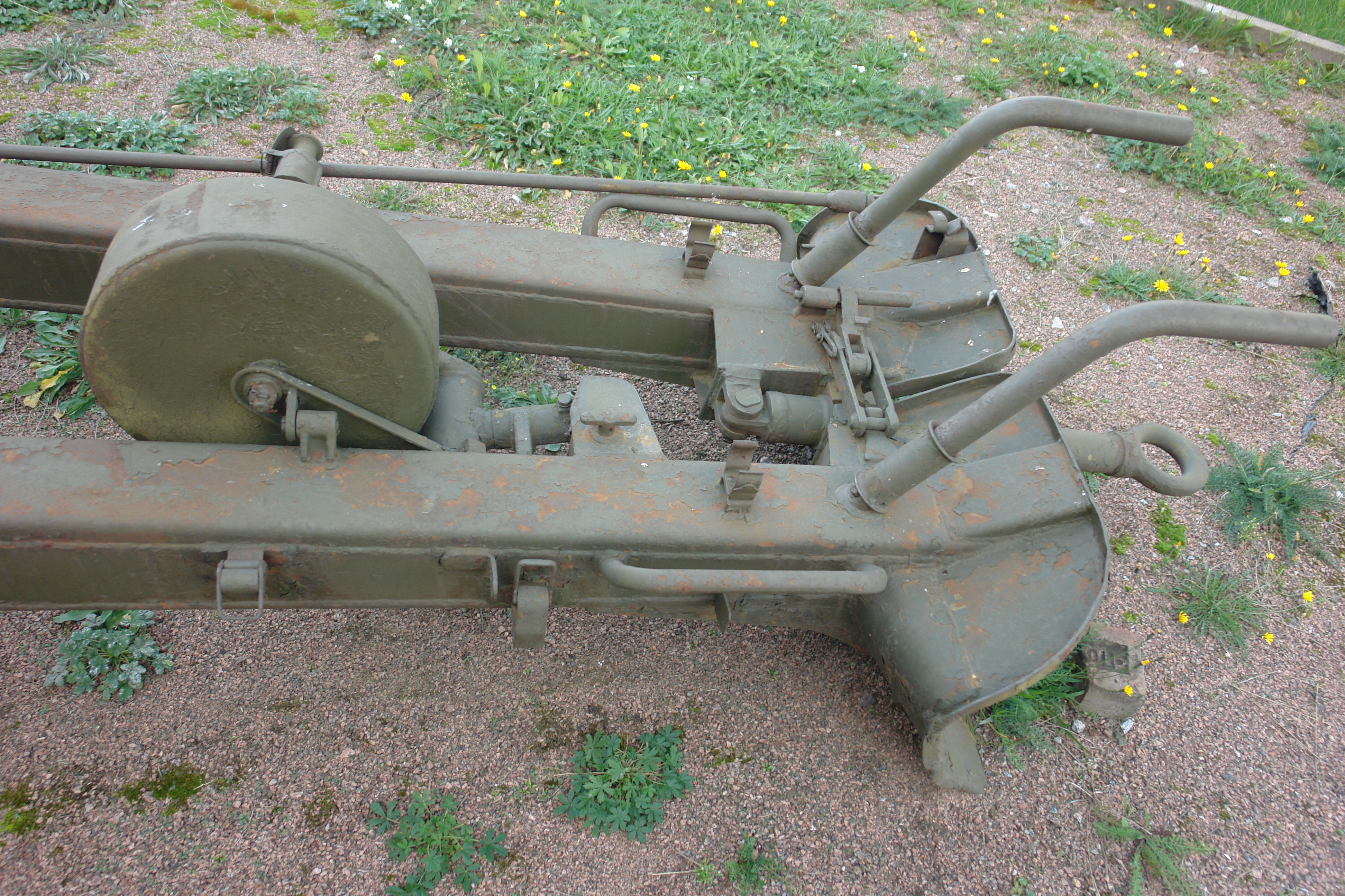 85-мм противотанковая пушка Д-48 (1953). Главный конструктор Ф.Ф. Петров Дальность, м: стрельбы - 18970, прямого выстрела - 1200. Скорострельность - 15 выстр/мин Масса орудия -2350 кг. Военно-исторический музей артиллерии, инженерных войск и войск связи, Санкт-Петербург.